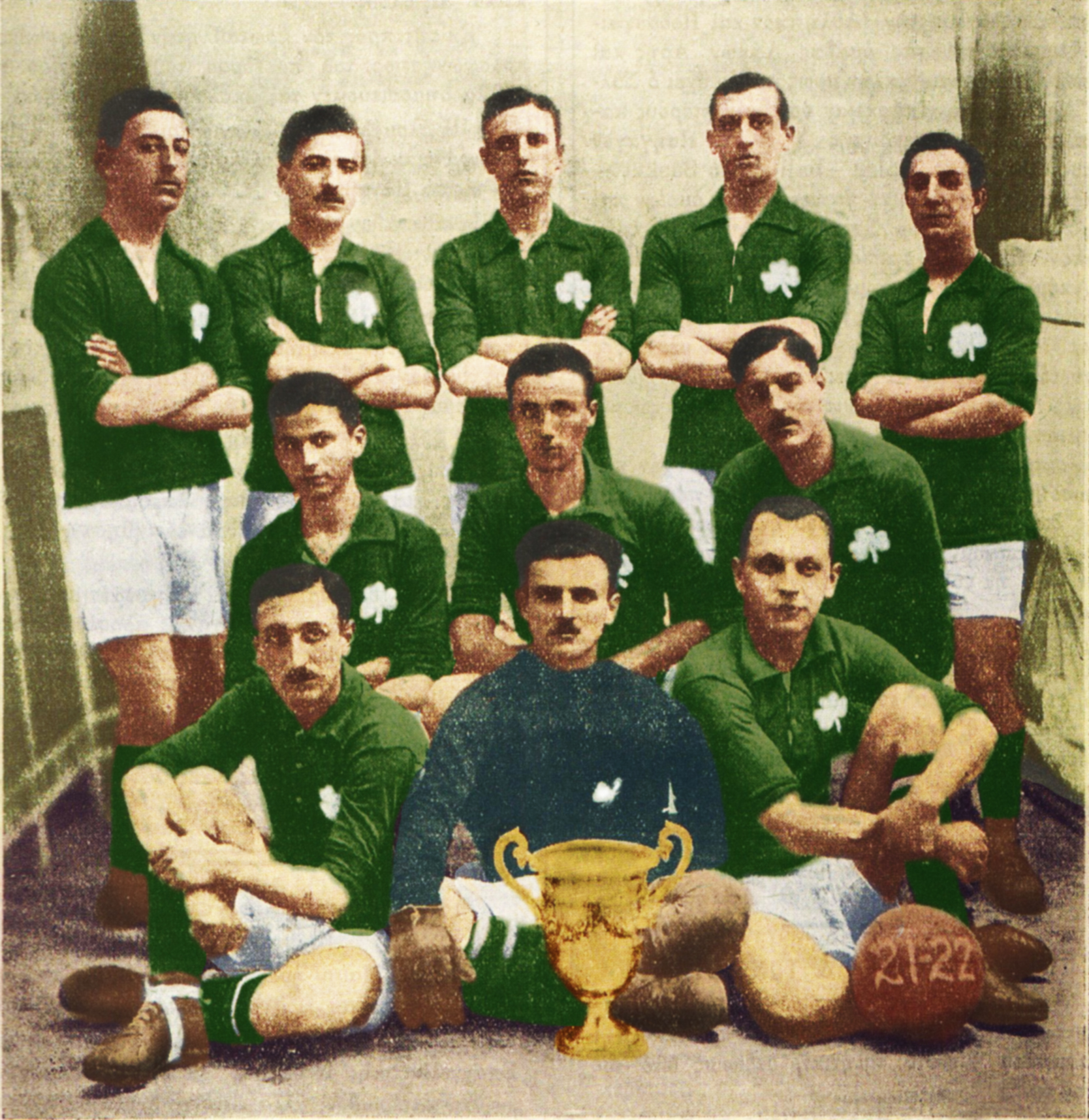 Η πρωταθλήτρια ομάδα του Παναθηναϊκού την περίδο 1921-22. Κ. Ζάκκας, Π. Σούτσος, Σ. Ασπρογέρακς, Λ. Πανουργιάς, Δ. Σταθόπουλος, Χρυσοχοΐδης, Λ. Βλαχόπουλος, Α. Καντώνης, Μ. Κρίσπης, Λ. Καλογερόπουλος, Α. Νικολαΐδης. Χρωματική επεξεργασία από το user:Sportingn